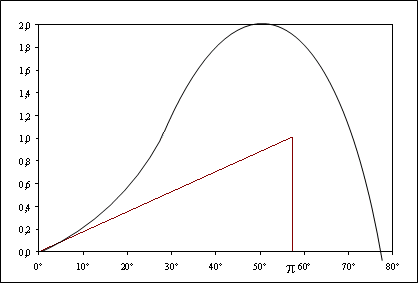 Eigen ontwerp.